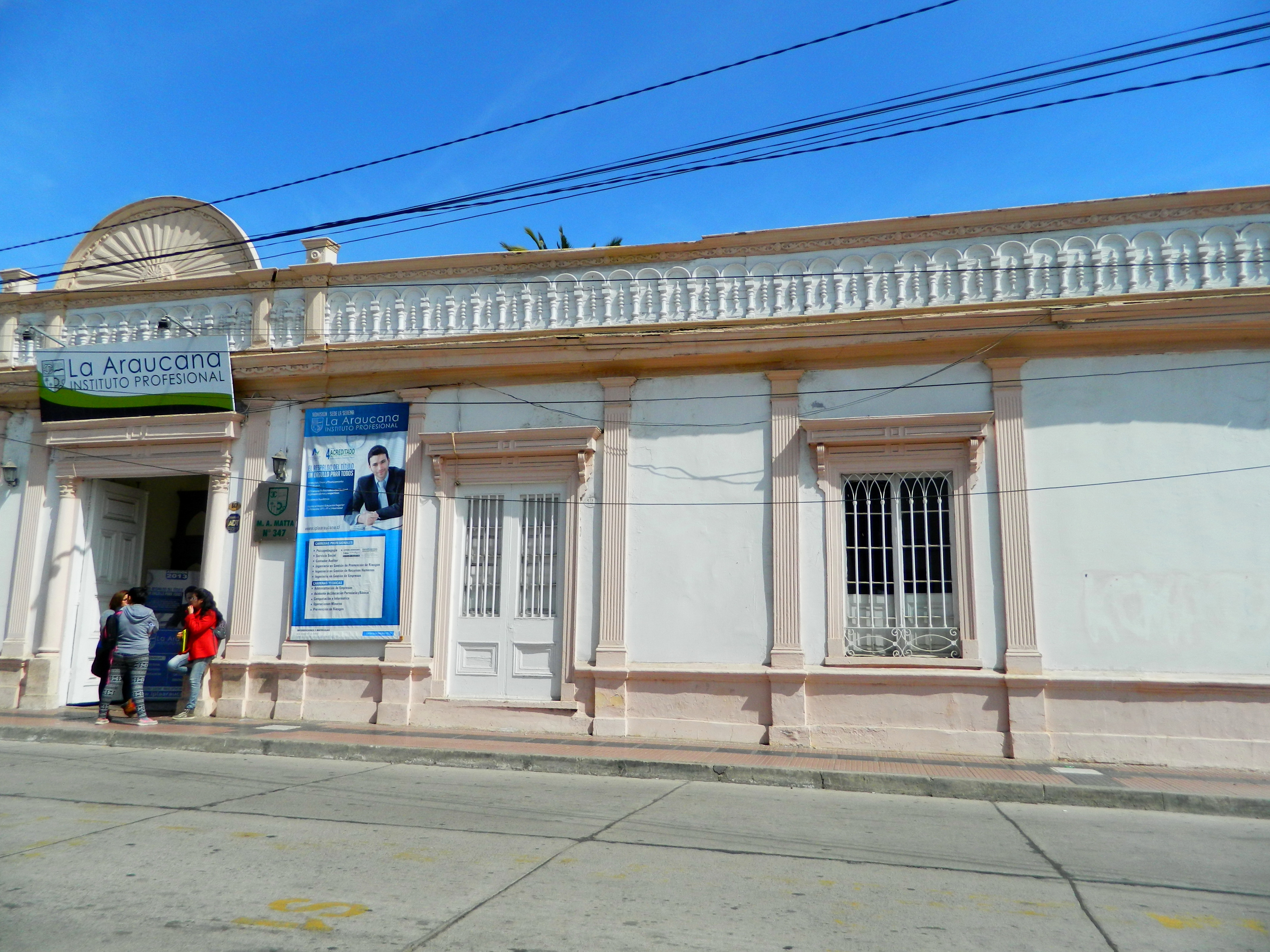 Casa Herreros This is a photo of a national monument in Chile: 347